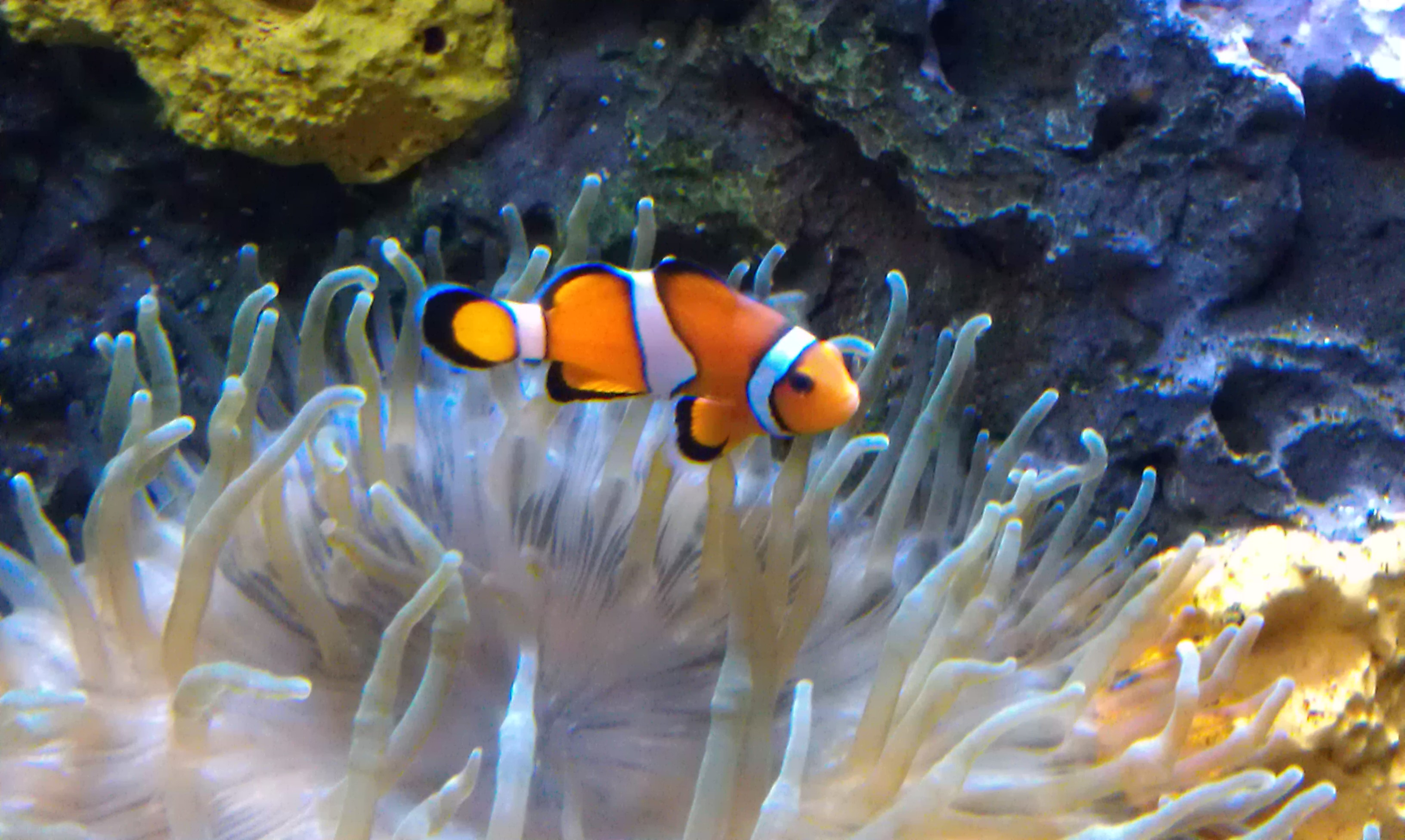 null